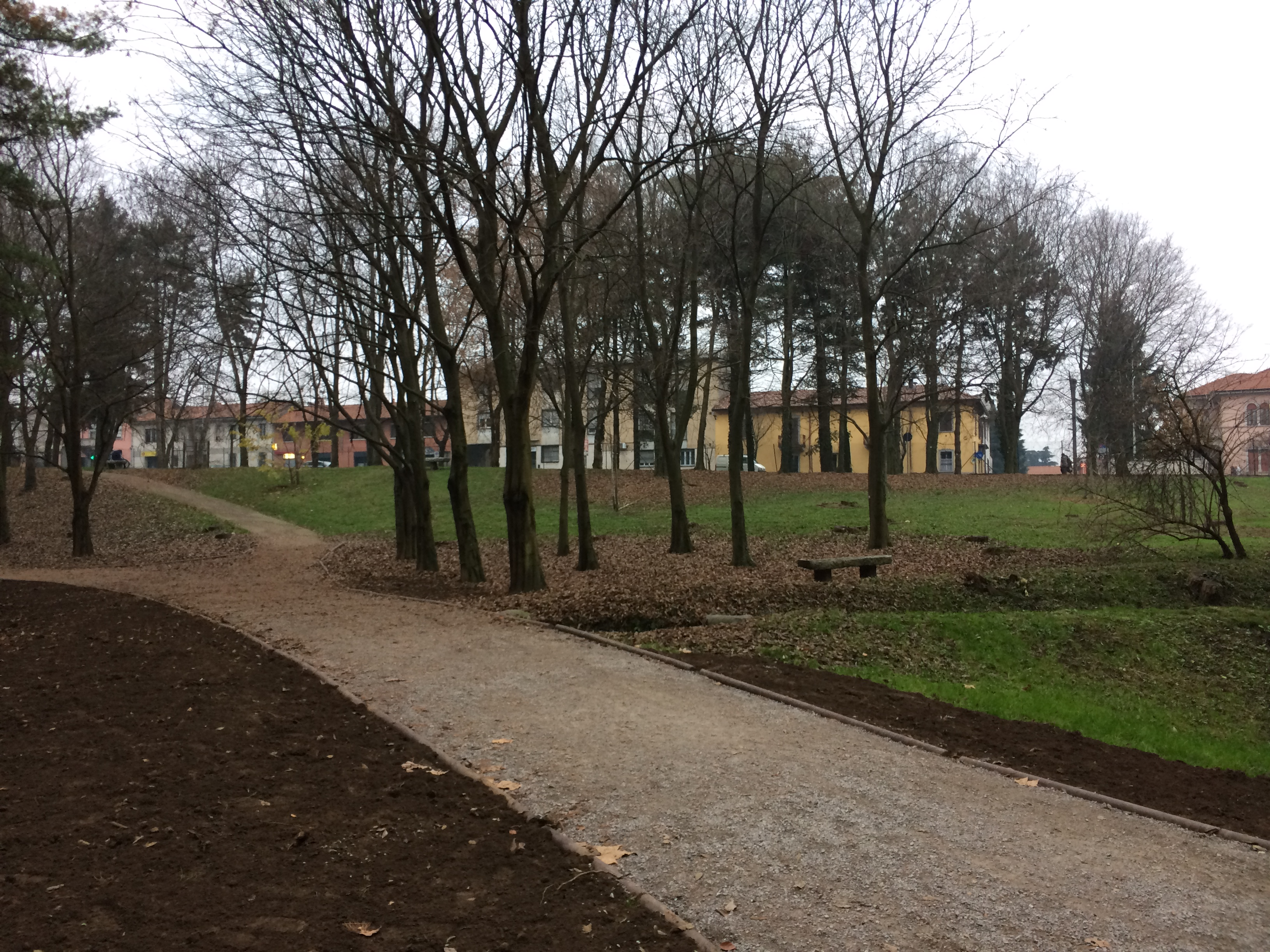 Parco Castello a Legnano. Sullo sfondo si vede il quartiere legnanese di Costa San Giorgio dove, secondo alcune ipotesi, potrebbe essere stata combattuta la battaglia di Legnano.